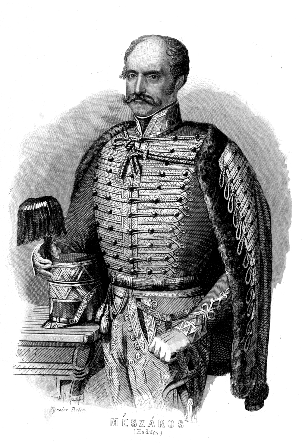 Mészáros Lázár (Baja, 1796. február 20. – Eywood, Anglia, 1858. november 16.) honvédaltábornagy, hadügyminiszter.